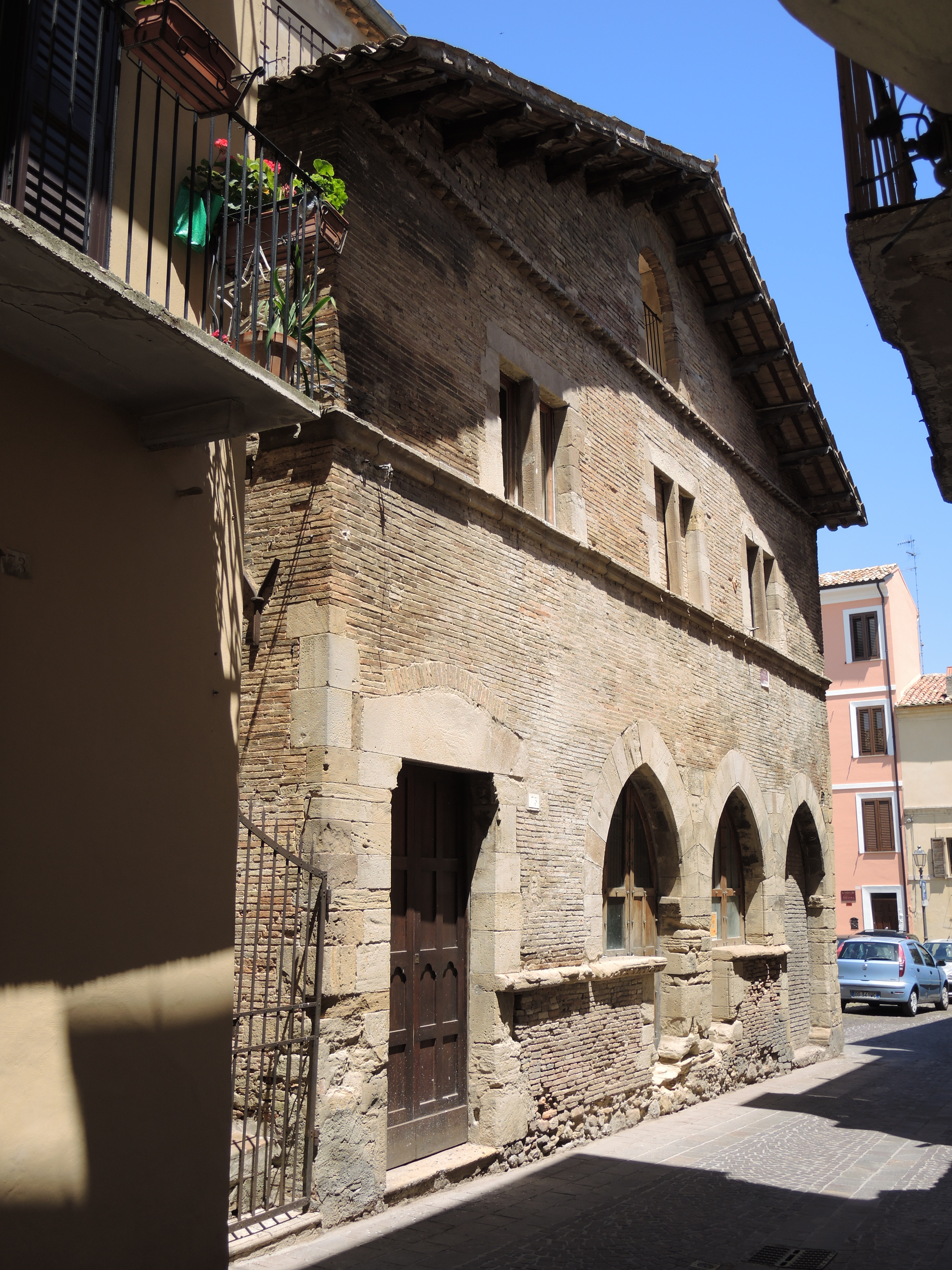 Lanciano - Botteghe medievali